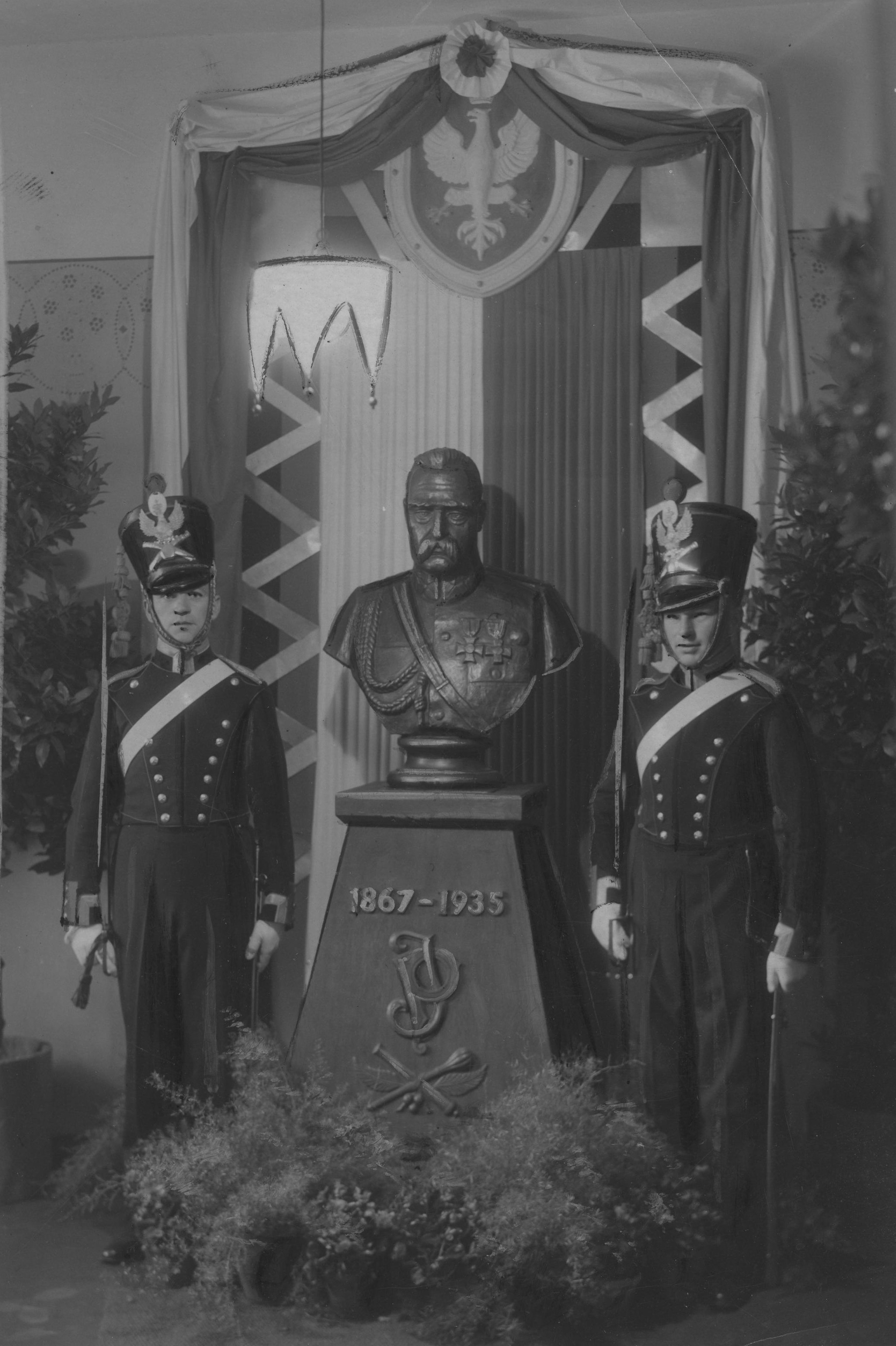 Święto 4 Pułku Artylerii Lekkiej w Inowrocławiu. Odsłonięcie popiersia Marszałka Józefa Piłsudskiego w sali stołówki podoficerskiej 4 pal-u w Inowrocławiu, ufundowanego przez korpus podoficerski pułku. Koncern Ilustrowany Kurier Codzienny - Archiwum Ilustracji. Sygnatura: 1-W-1490-2